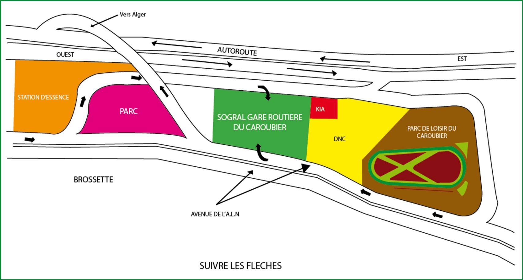 Accès Gare Routière Caroubier Alger